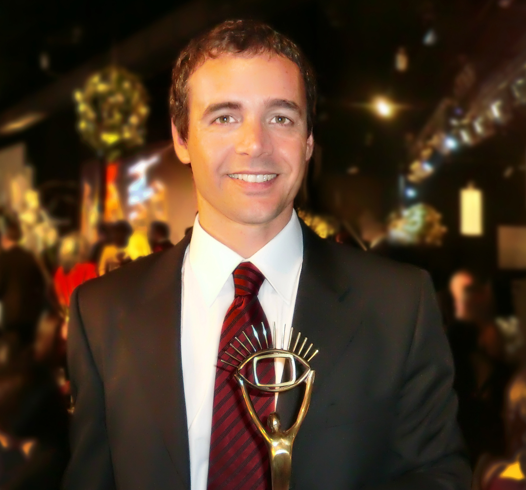 Sebastian Beltrame (de Uruguay) recibiendo el premio Iris.